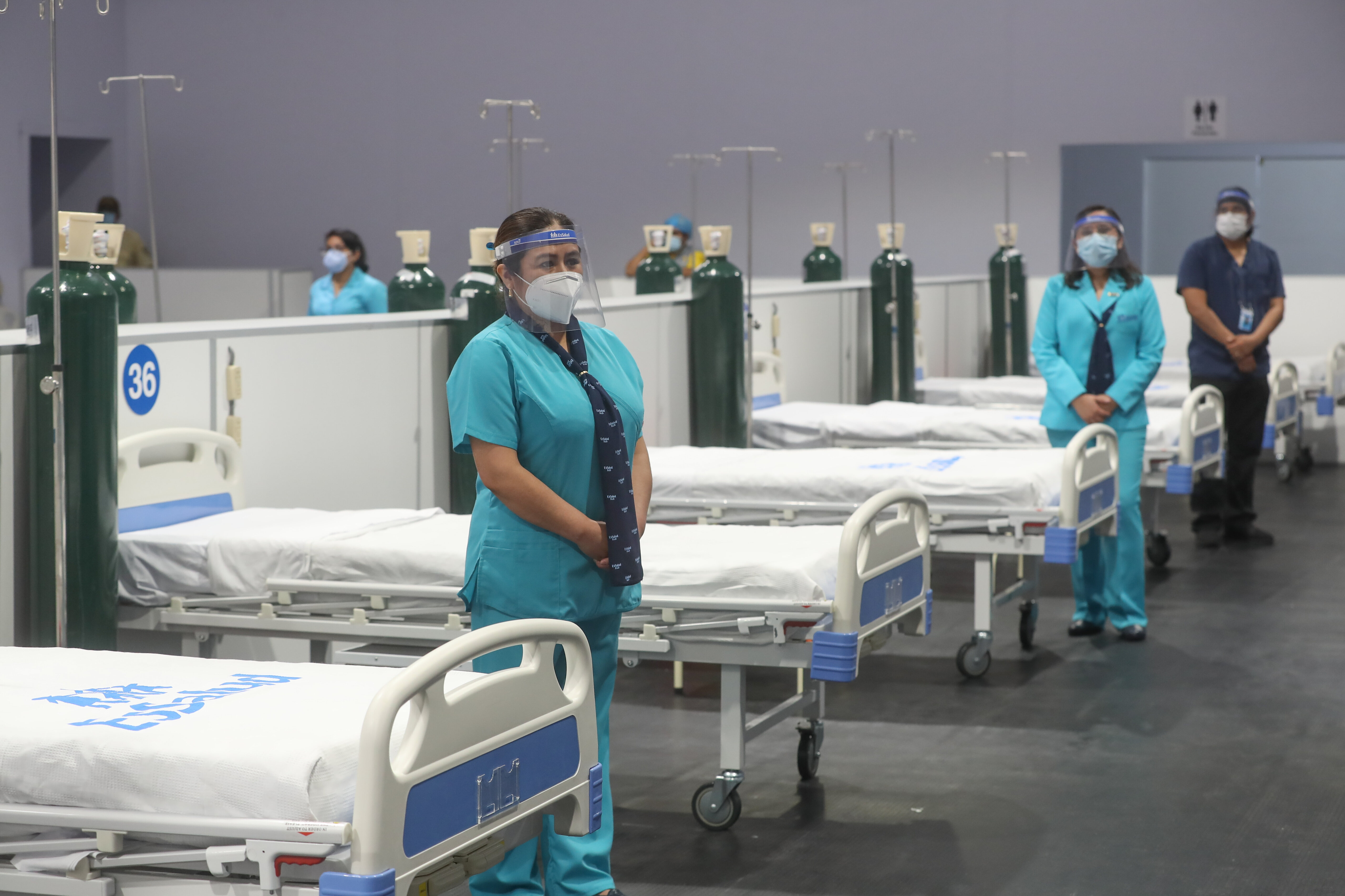 MINISTRO DE DEFENSA VIAJÓ A MOQUEGUA E ILO PARA COORDINAR ACCIONES FRENTE AL COVID-19